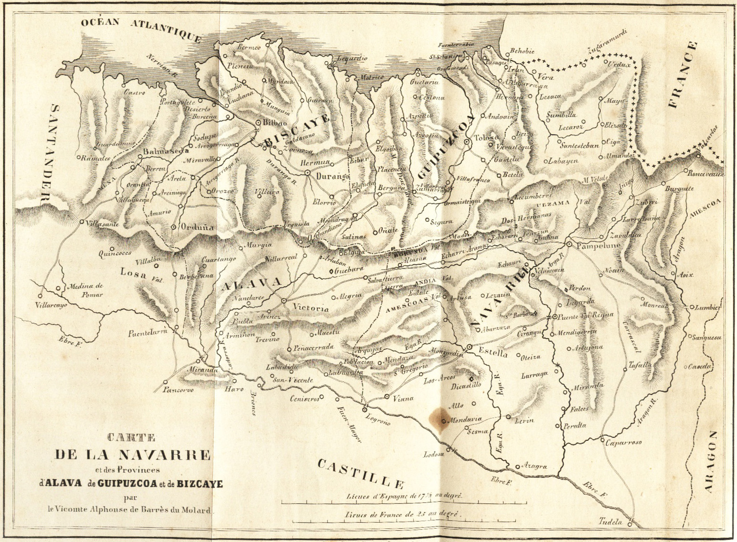 Carte de la Navarre et des Provinces d 'Alava, de Guipuzcoa et de Bizcaya par le Vicomte Alphonse de Barrés de Molard. (¿1842?)Alphonse de Barrés de Molard. Paris-Lyon 1842